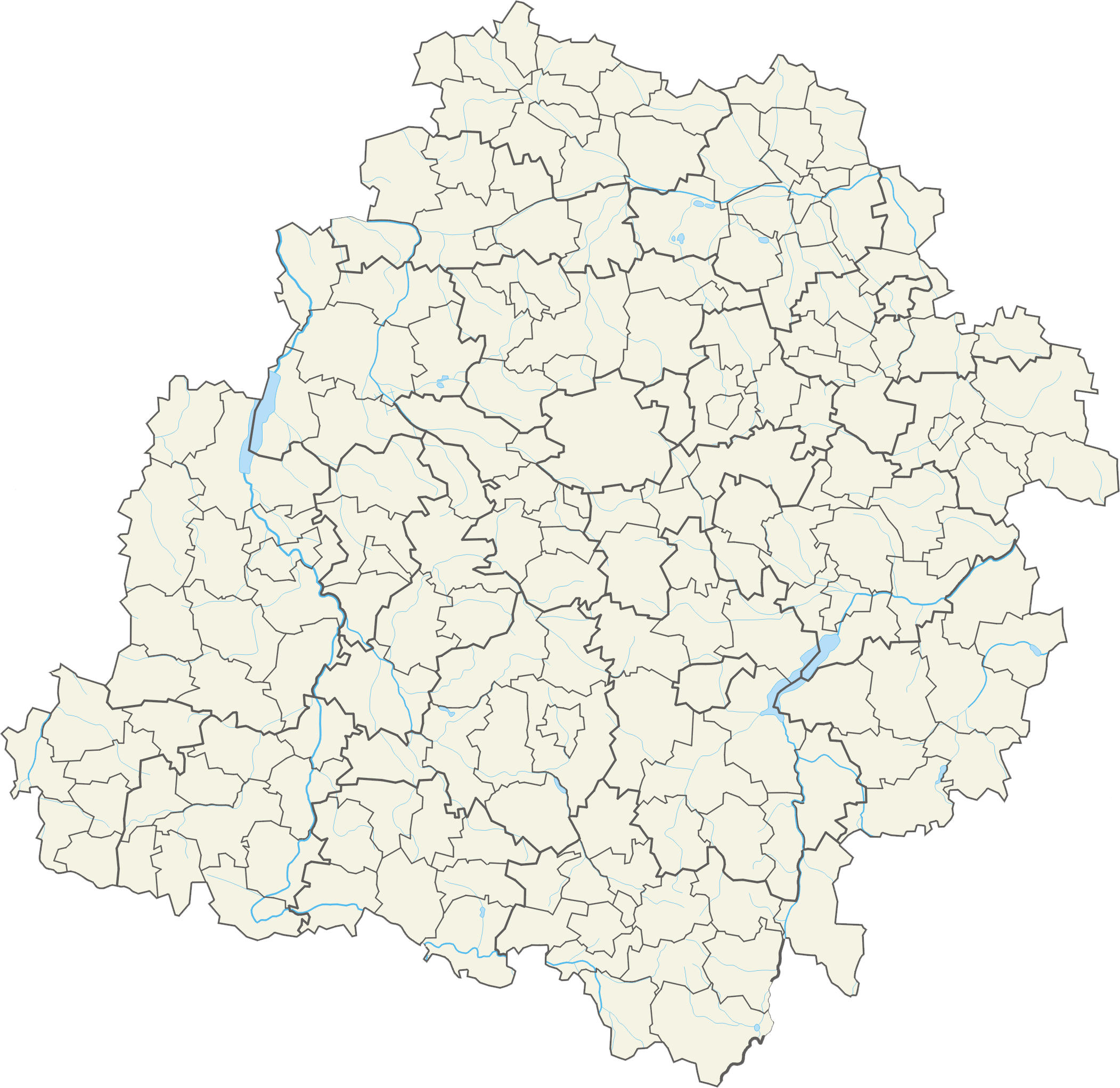 Województwo łódzkie – powiaty i gminy Współrzędne graniczne mapy: N: 52.3940° N S: 50.8432° N W: 18.0746° E E: 20.6593° E